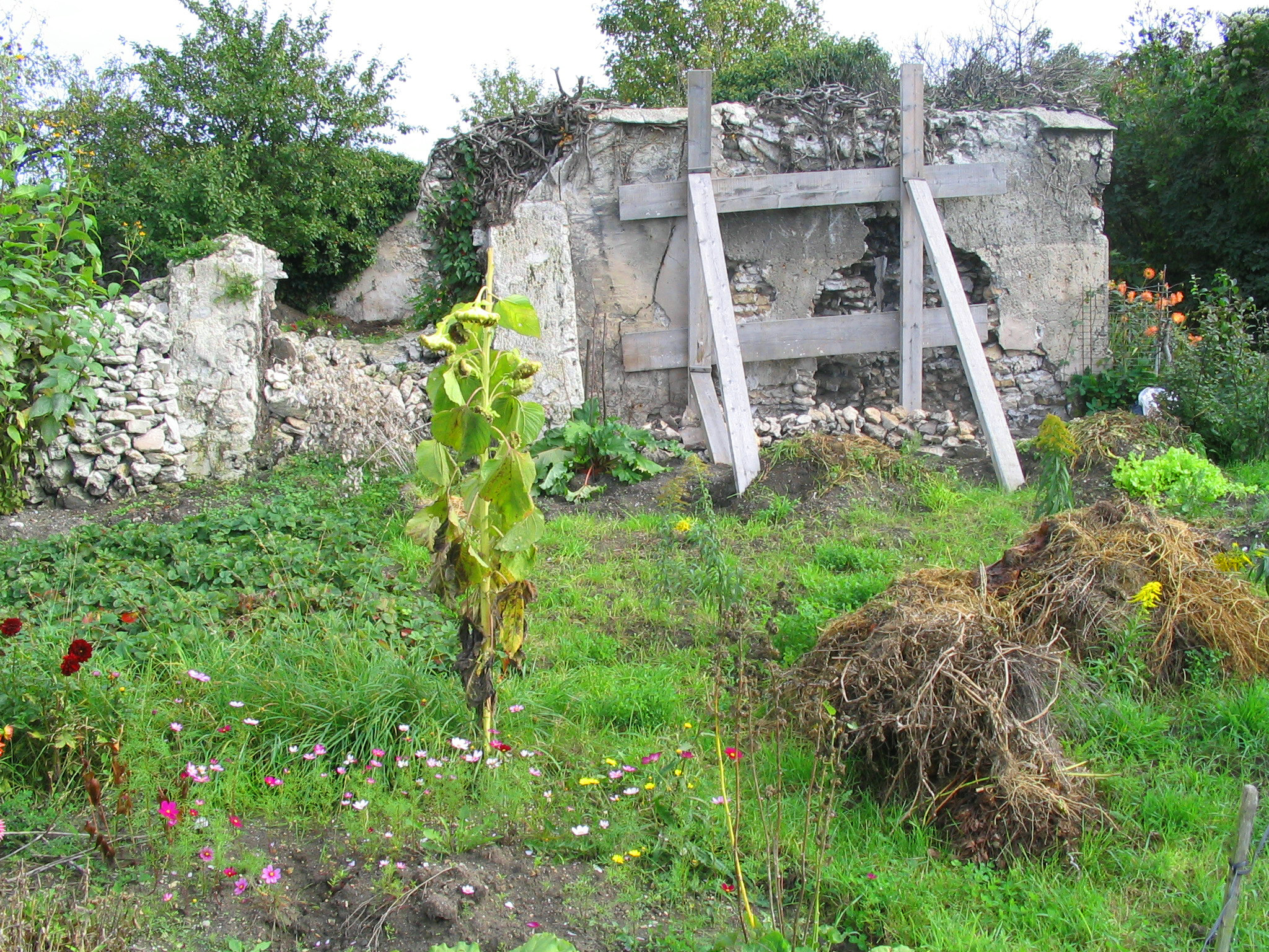 Murs à pêches à Montreuil - France Auteur/author: P.Charpiat - 2006